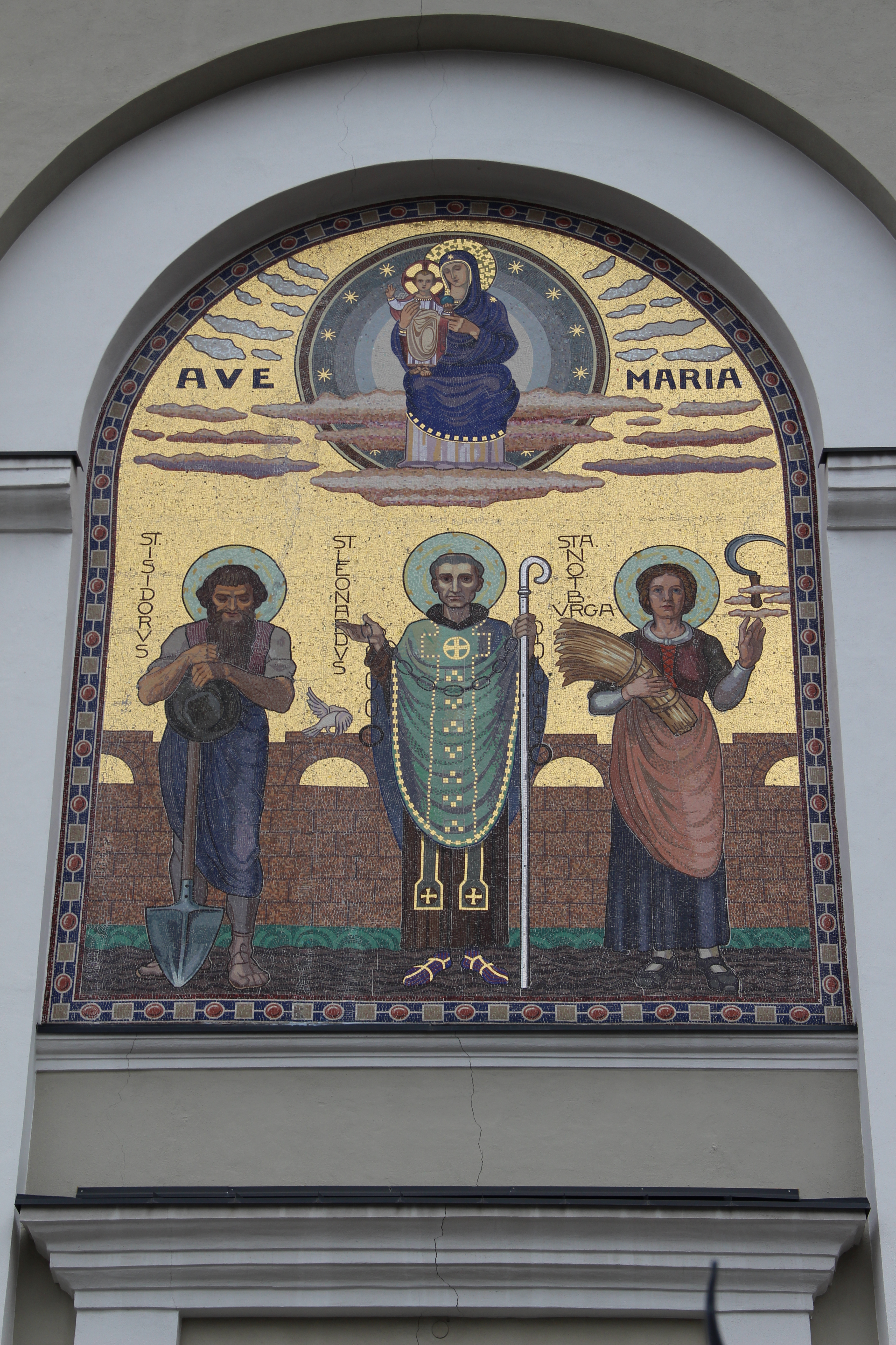 Kath. Pfarrkirche hl. Leonard in Mairhof und Friedhof